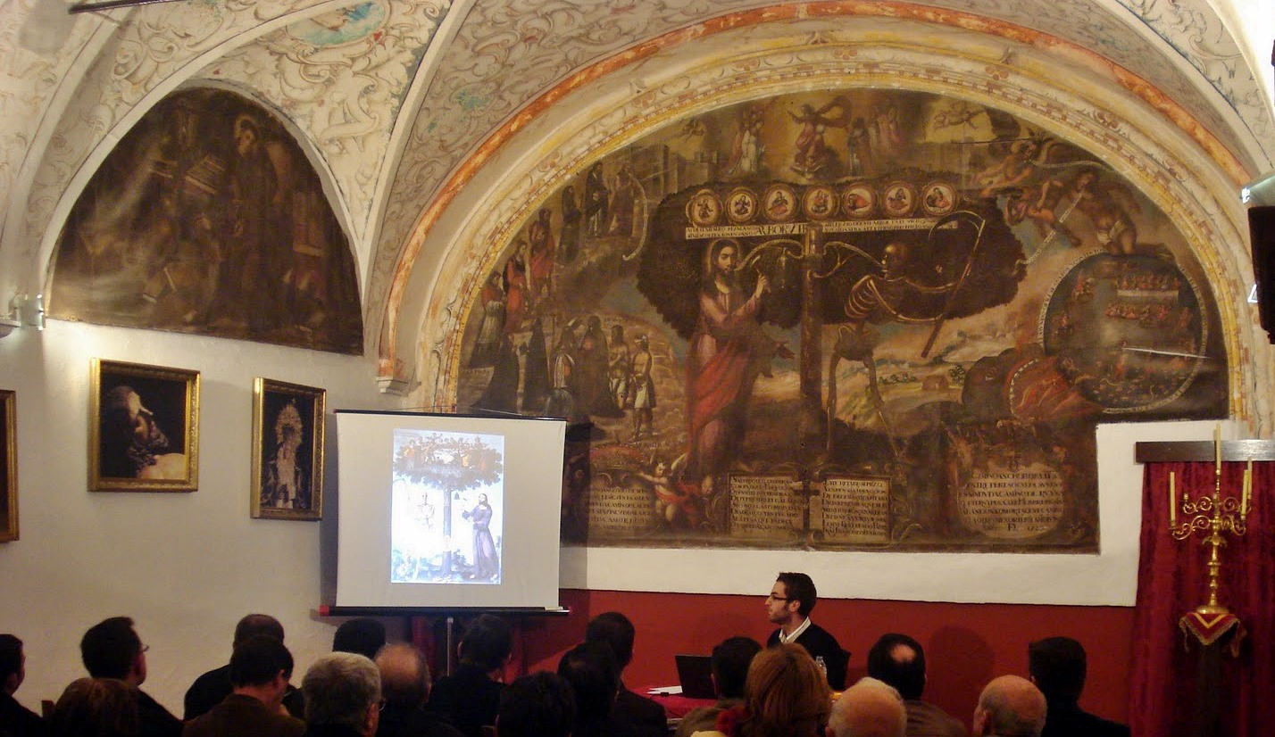 El lienzo se encuentra en las dependencias del antiguo convento exclaustrado de franciscanos alcantarinos, de autor anónimo y fechado en 1723.